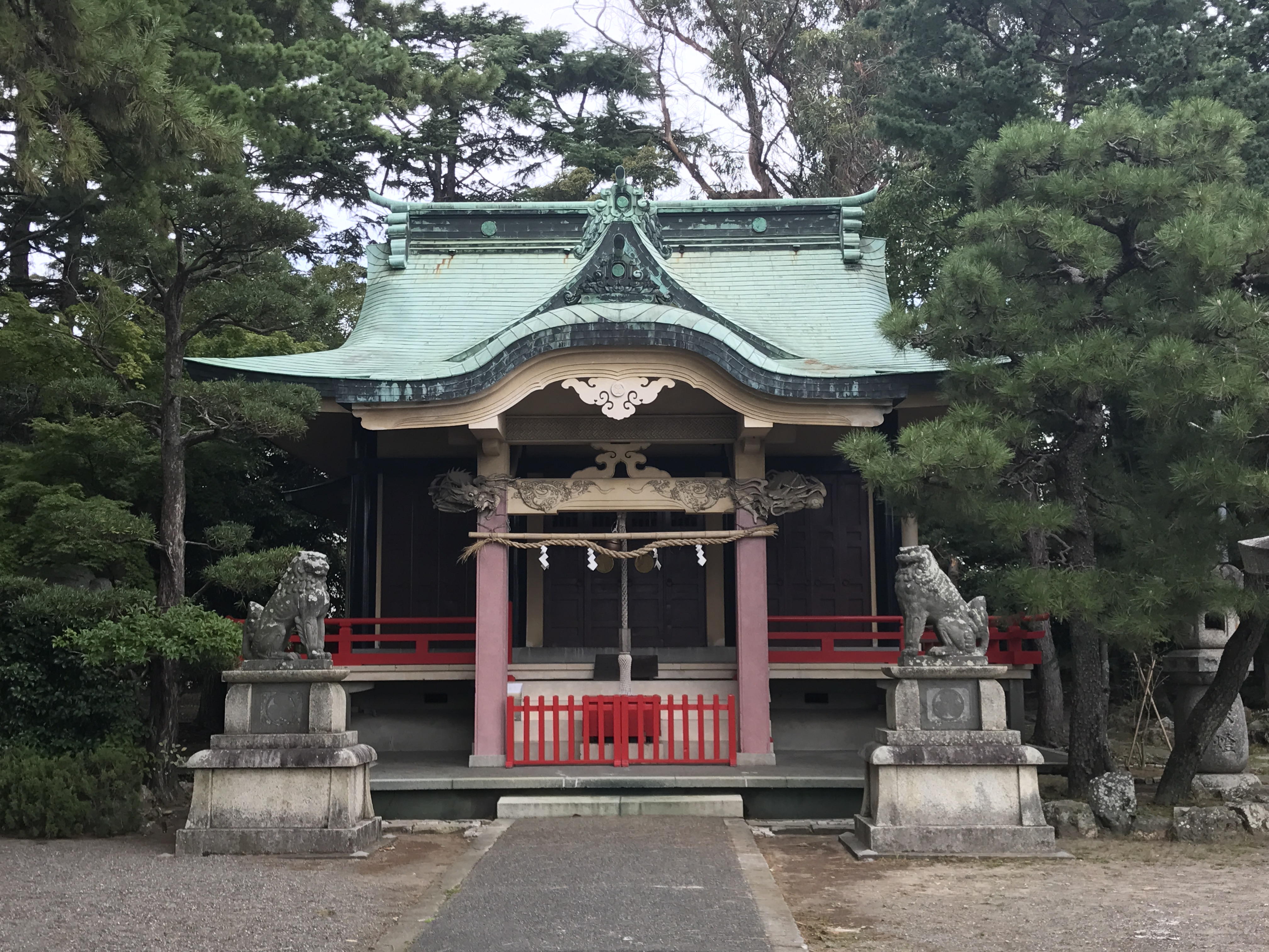 静岡県浜松市の神社。元城町東照宮の正面。